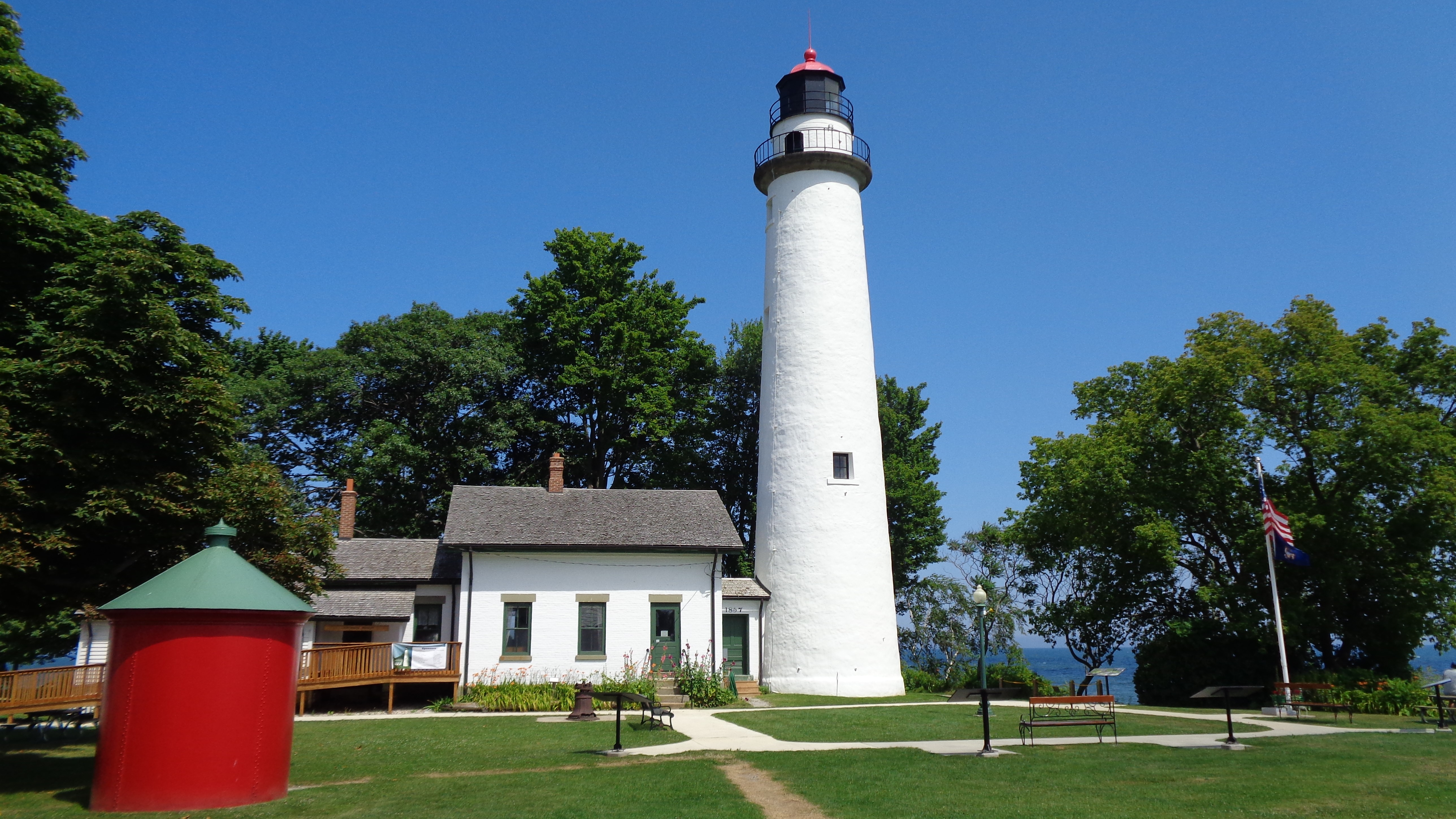 Depicted place: Pointe aux Barques Light